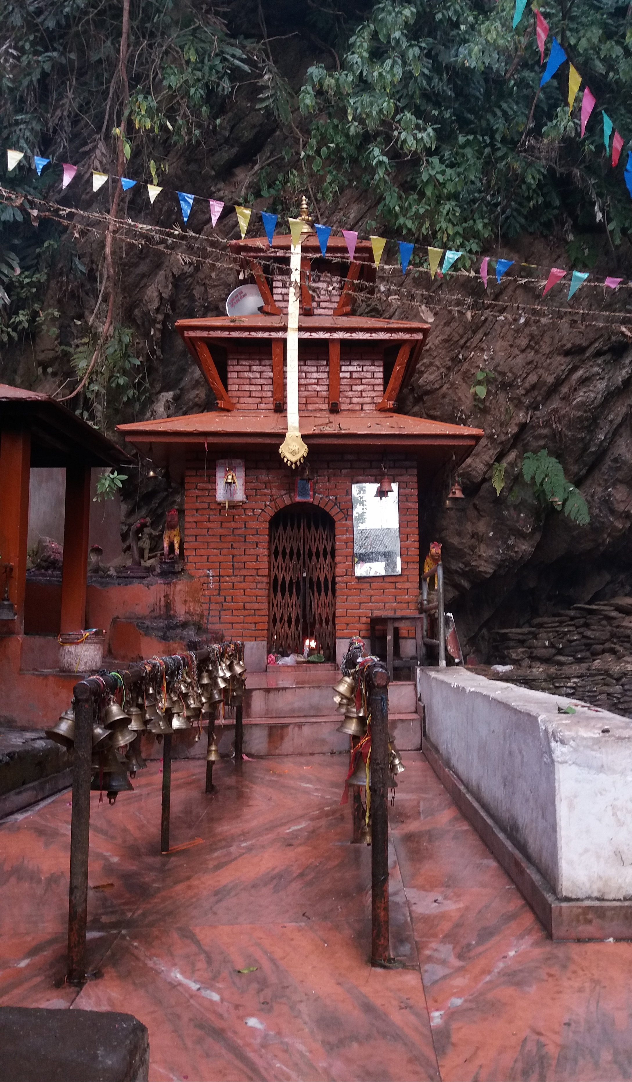 नेपाली: ढोरबाराहि मन्दिरको मुख्य पुजा स्थान